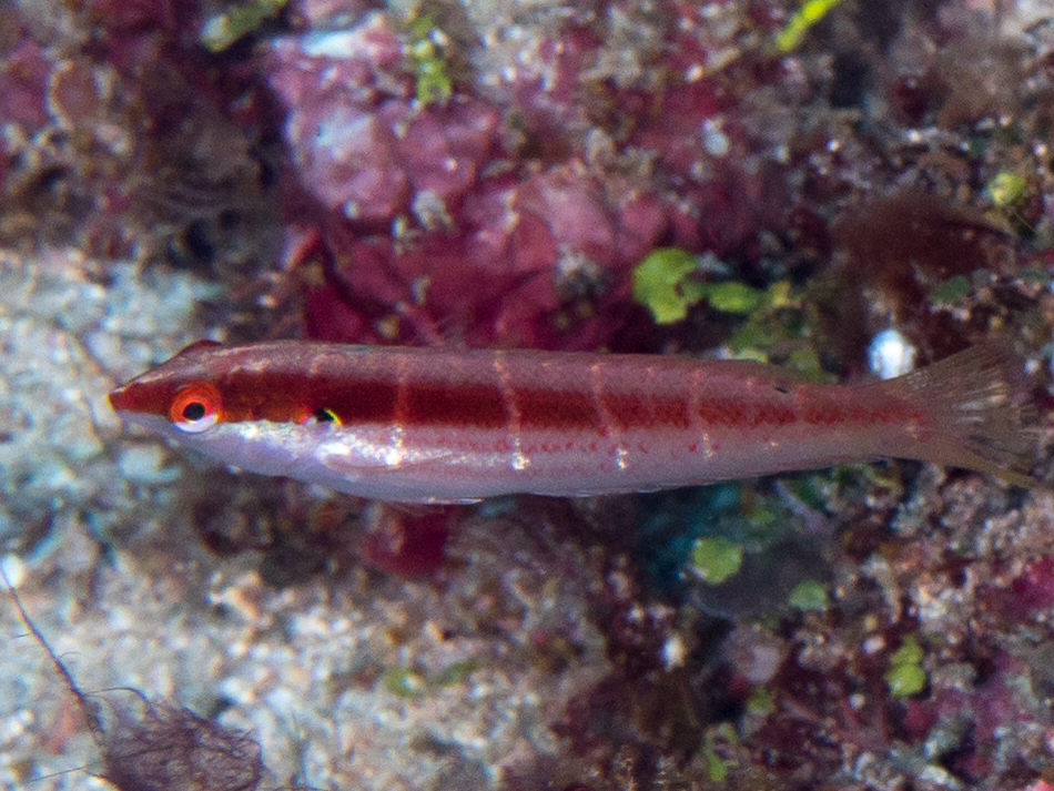 Morotai, Indonesia - Pale-barred coris (Coris dorsomacula)